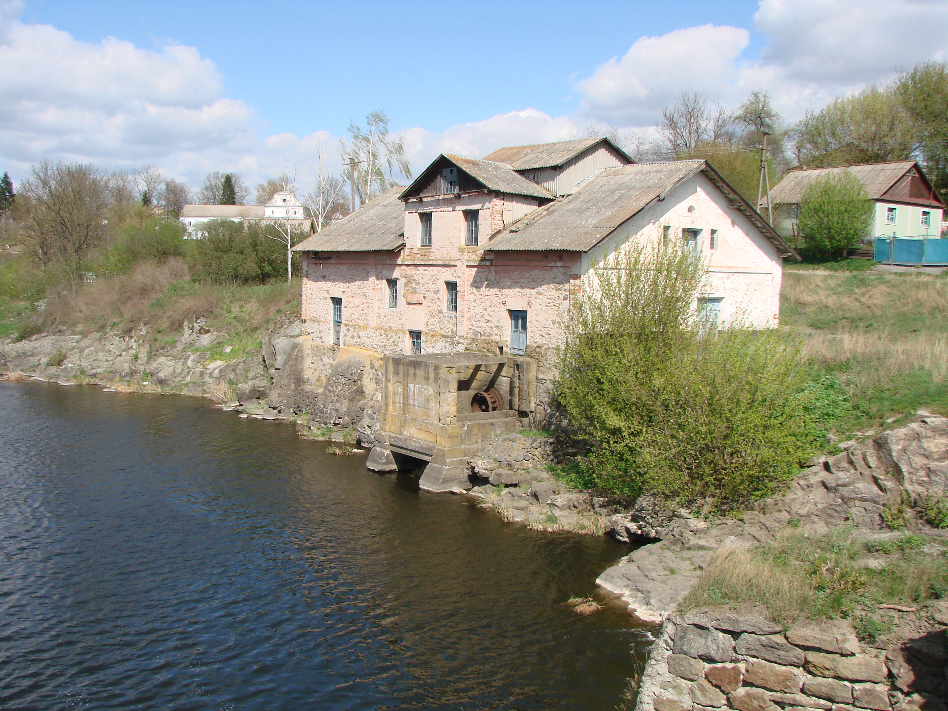 Lubar - młyn wodny